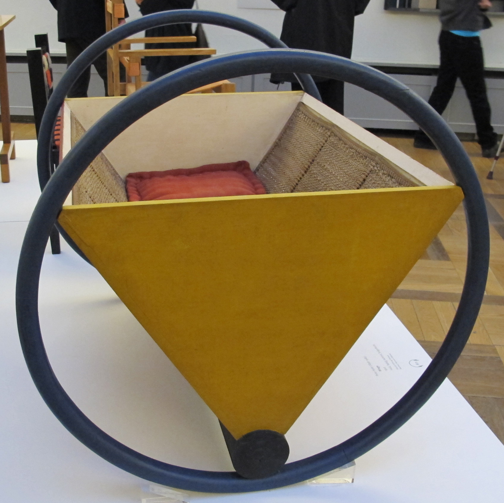 Peter Keler (German, 1898-1982): Querschwingende Wiege, 1922